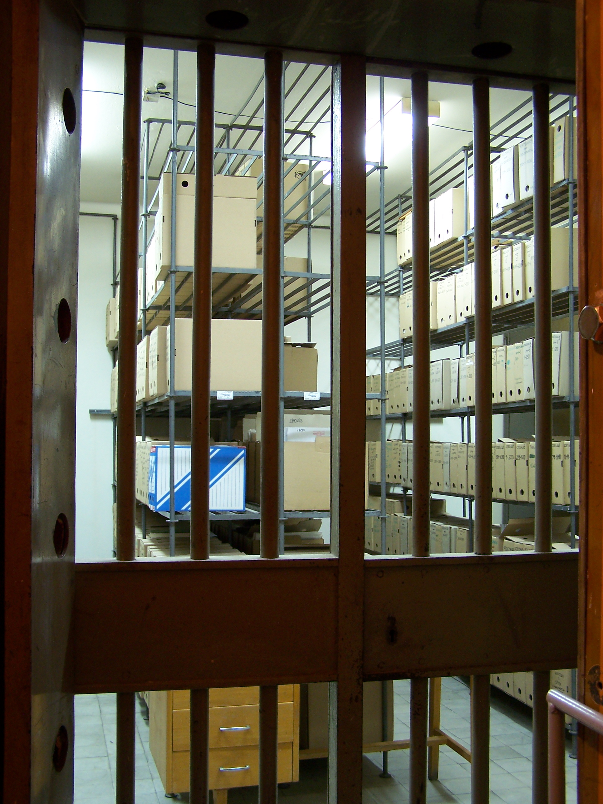 Skarbiec dawnego Sejmu Śląskiego. Dziś pomieszczenia archiwum Urzędu Wojewódzkiego w Katowicach.